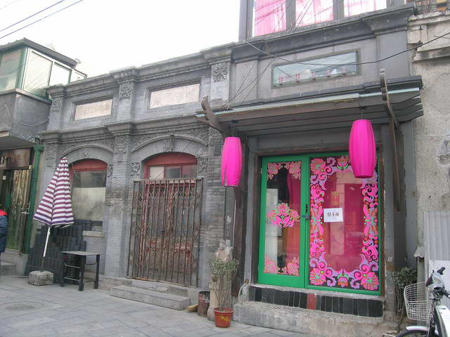 烟袋斜街的老店门脸 smartneddy 2005年1月22日摄于什刹海烟袋斜街